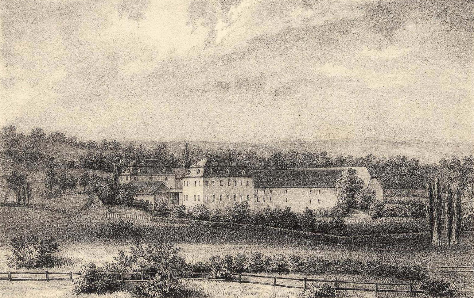 Litografie mit der Ansicht des Schlosses Dahlhausen in Menden